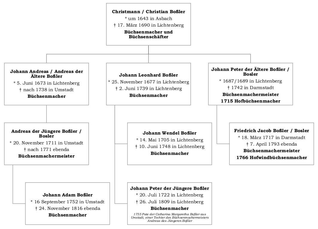 Die Nachfahren des Büchsenmachers und Büchsenschäfters Christmann Boßler aus Lichtenberg